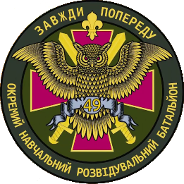 Нарукавний знак, 49 окремий навчальний розвідувальний батальйон